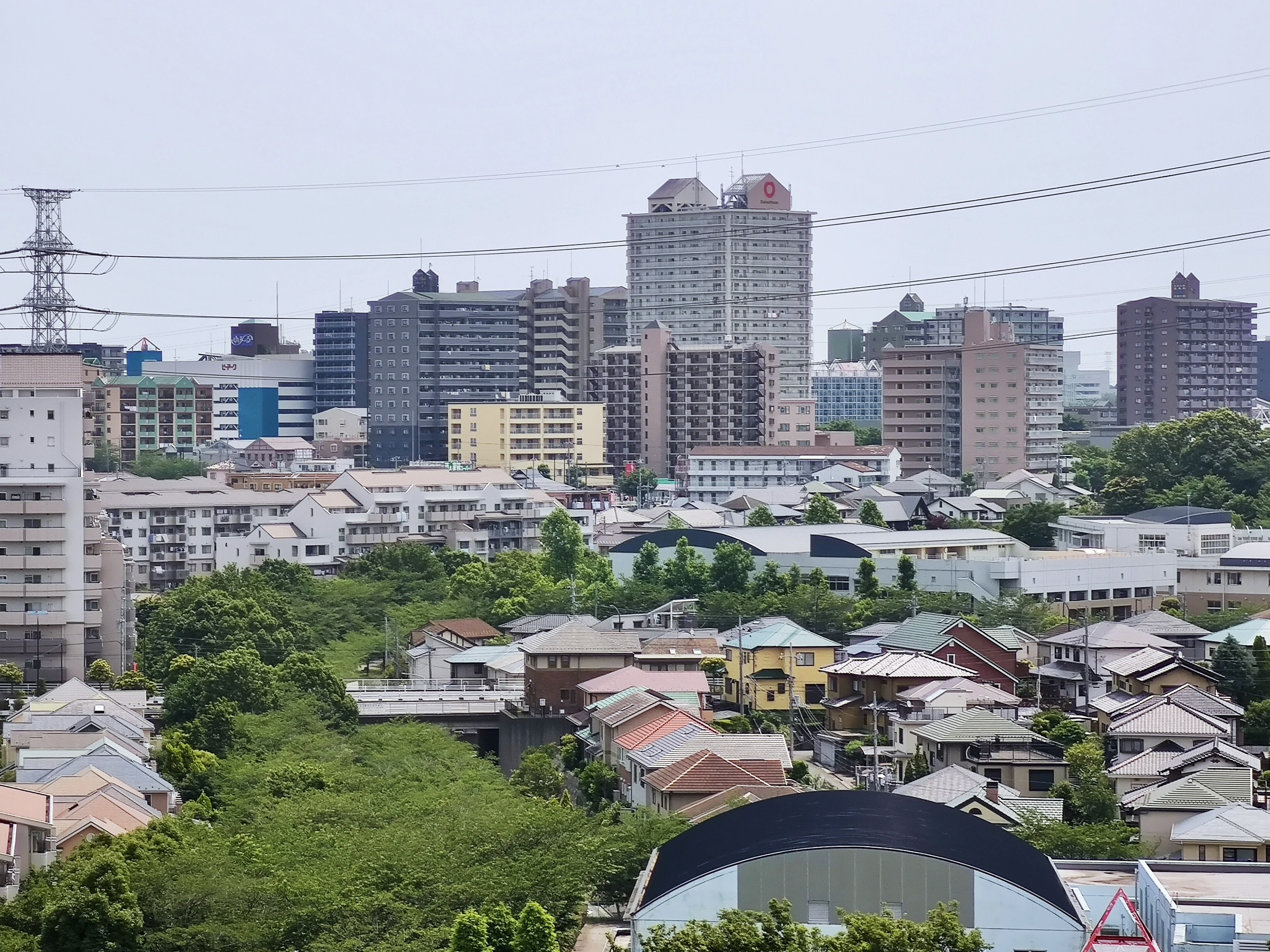 緑区の中心部おゆみ野鎌取駅方面